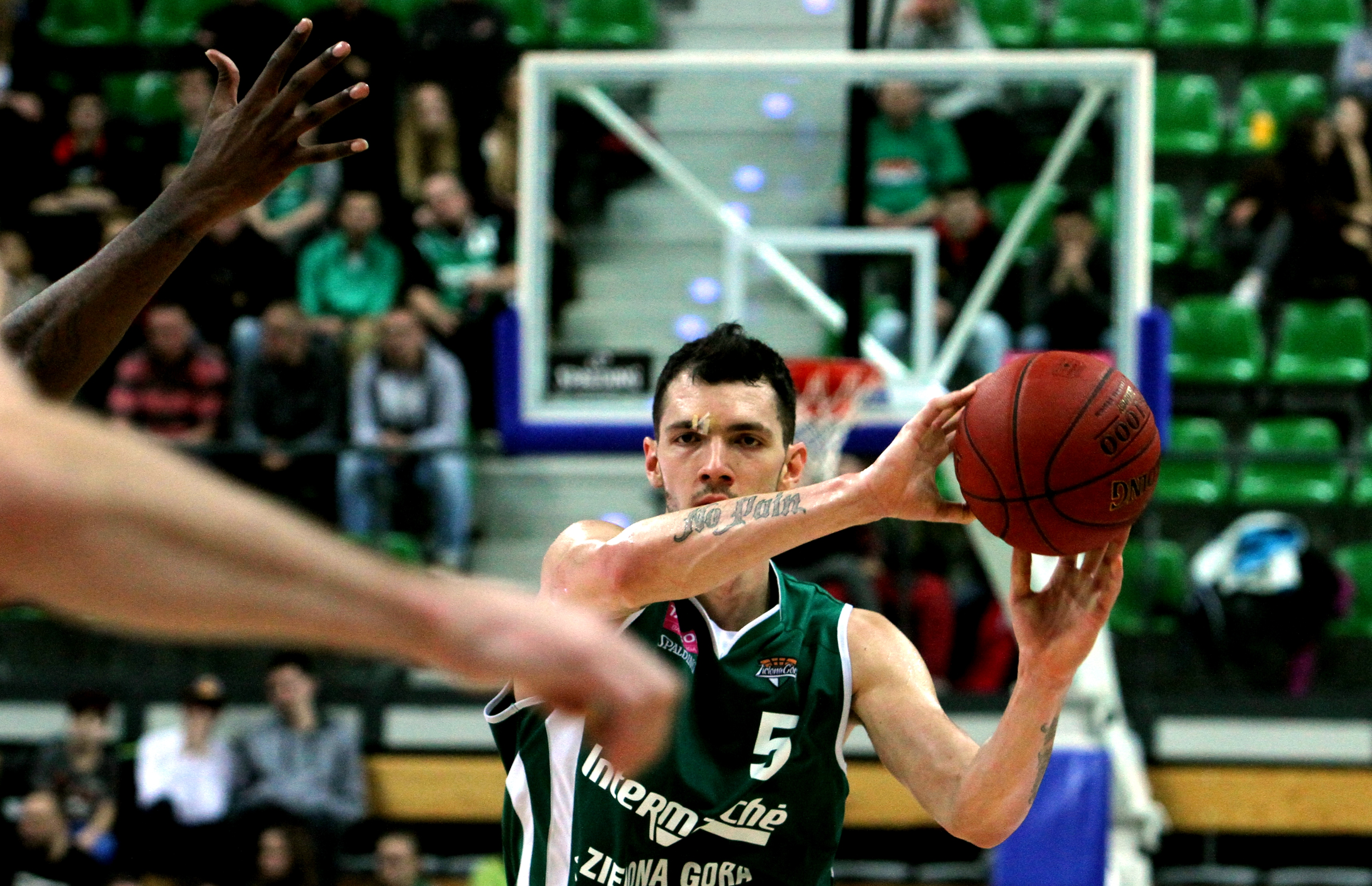 Aaron Cel, Stelmet Zielona Góra